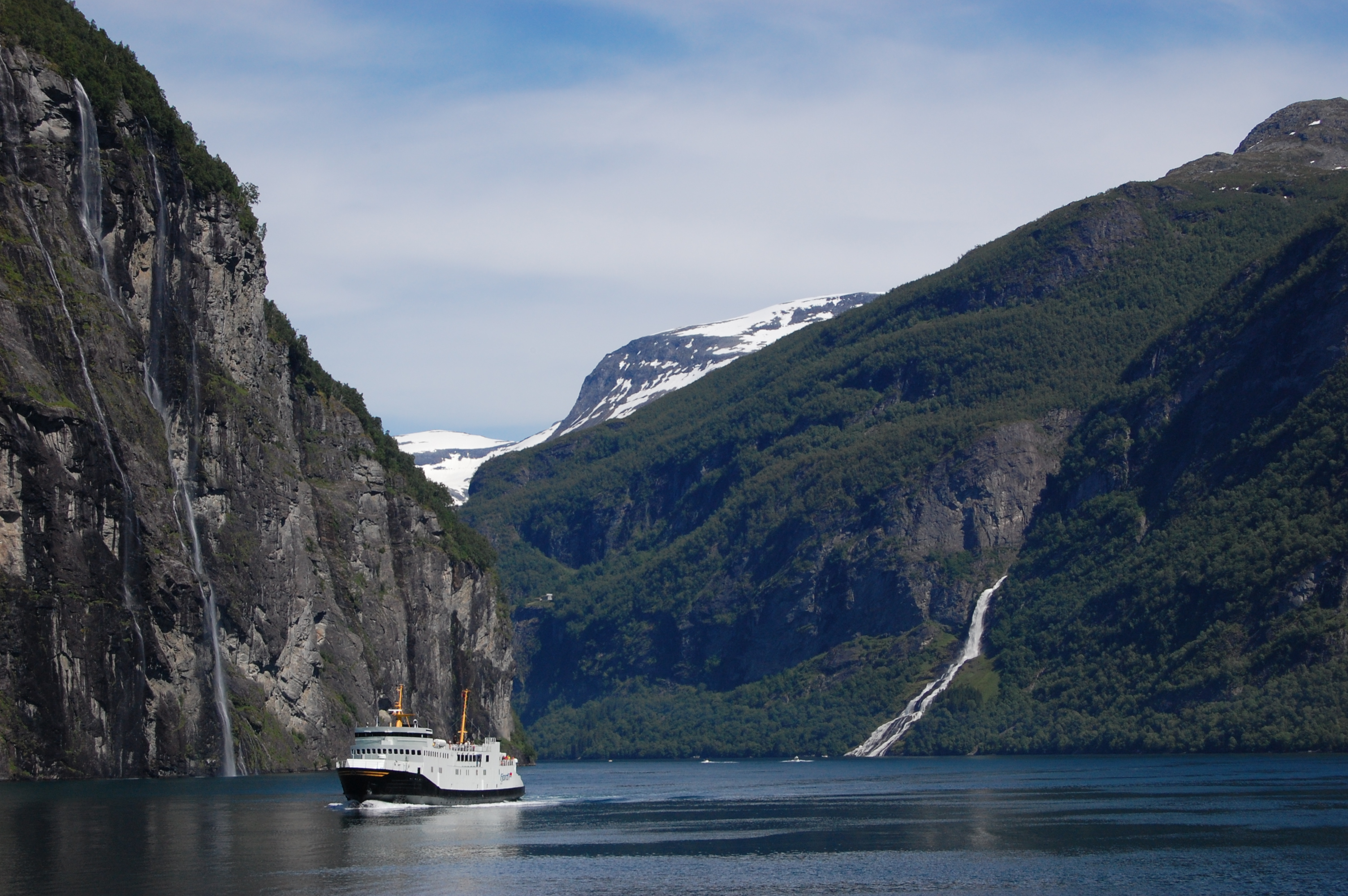 Geiranger Fjord